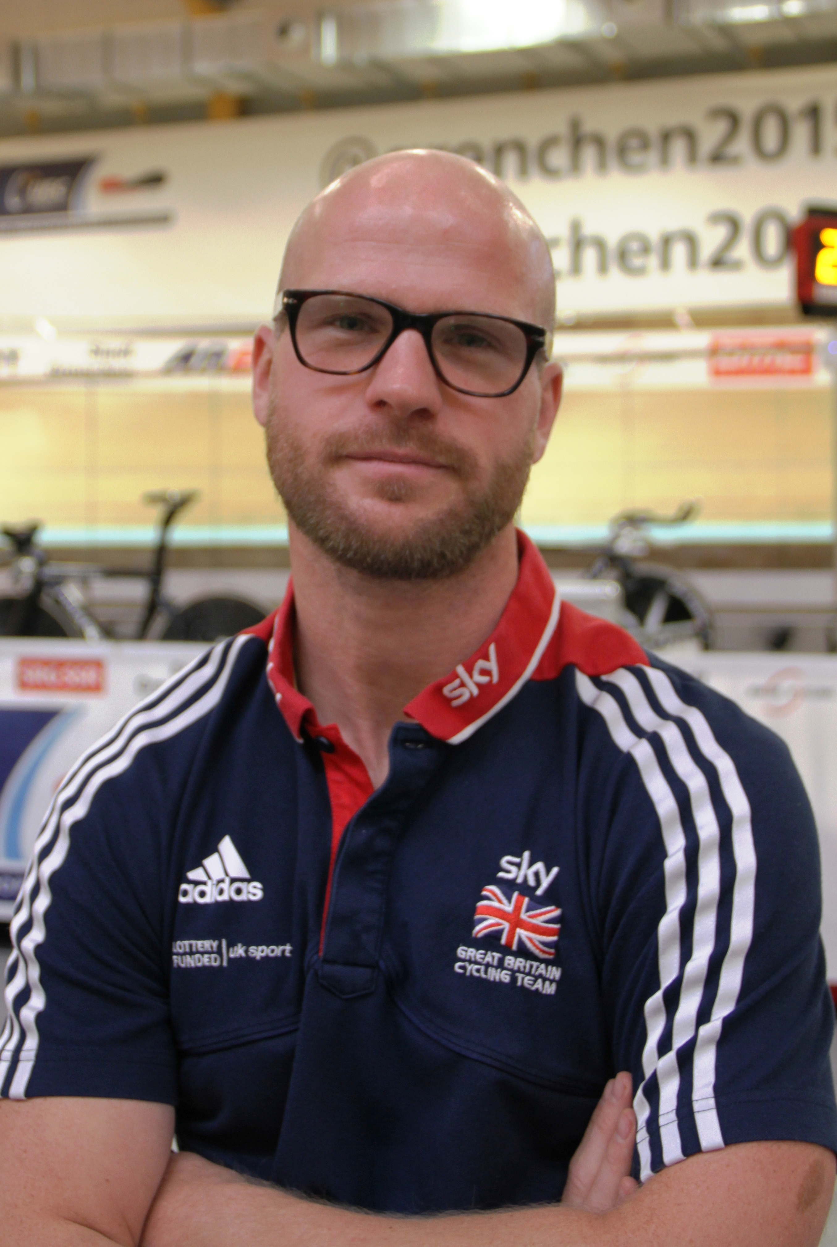 Jan van Eijden, British Coach The making of this document was supported by the Community-Budget of Wikimedia Germany.